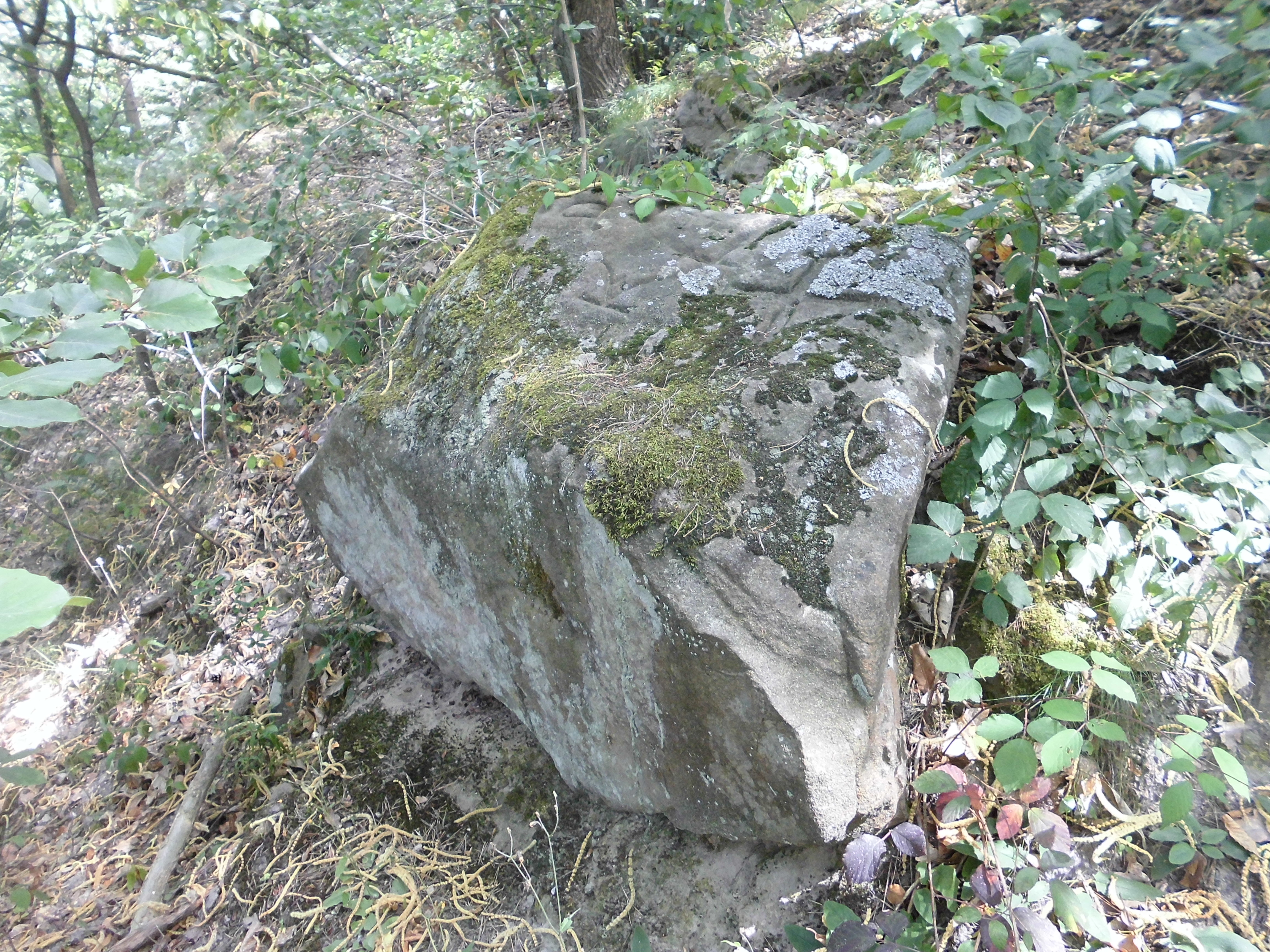 Loogfels im Margarethental des Pfälzerwalds an der Gemarkungsgrenze zwischen Deidesheim und Forst an der Weinstraße